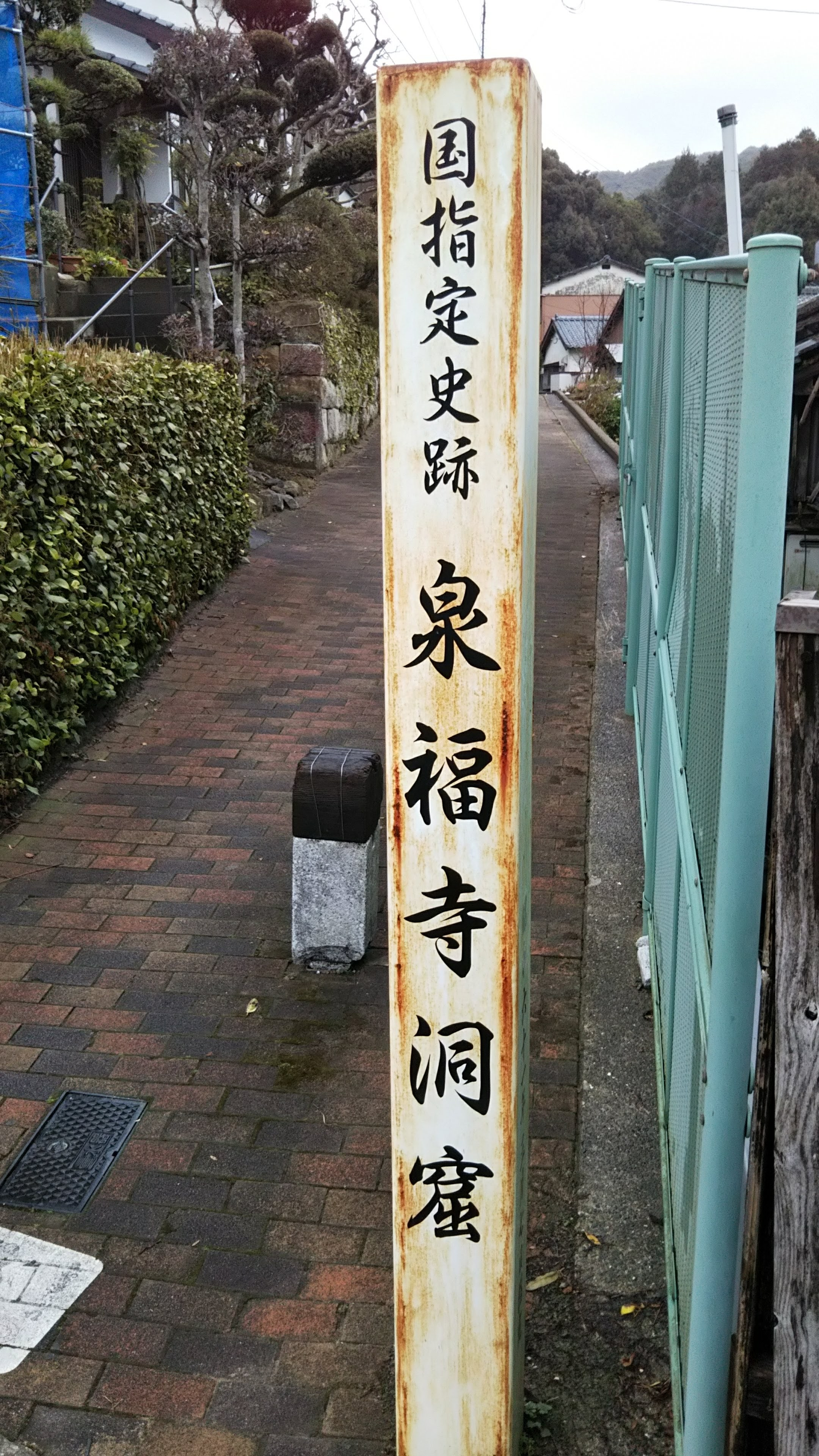 入口